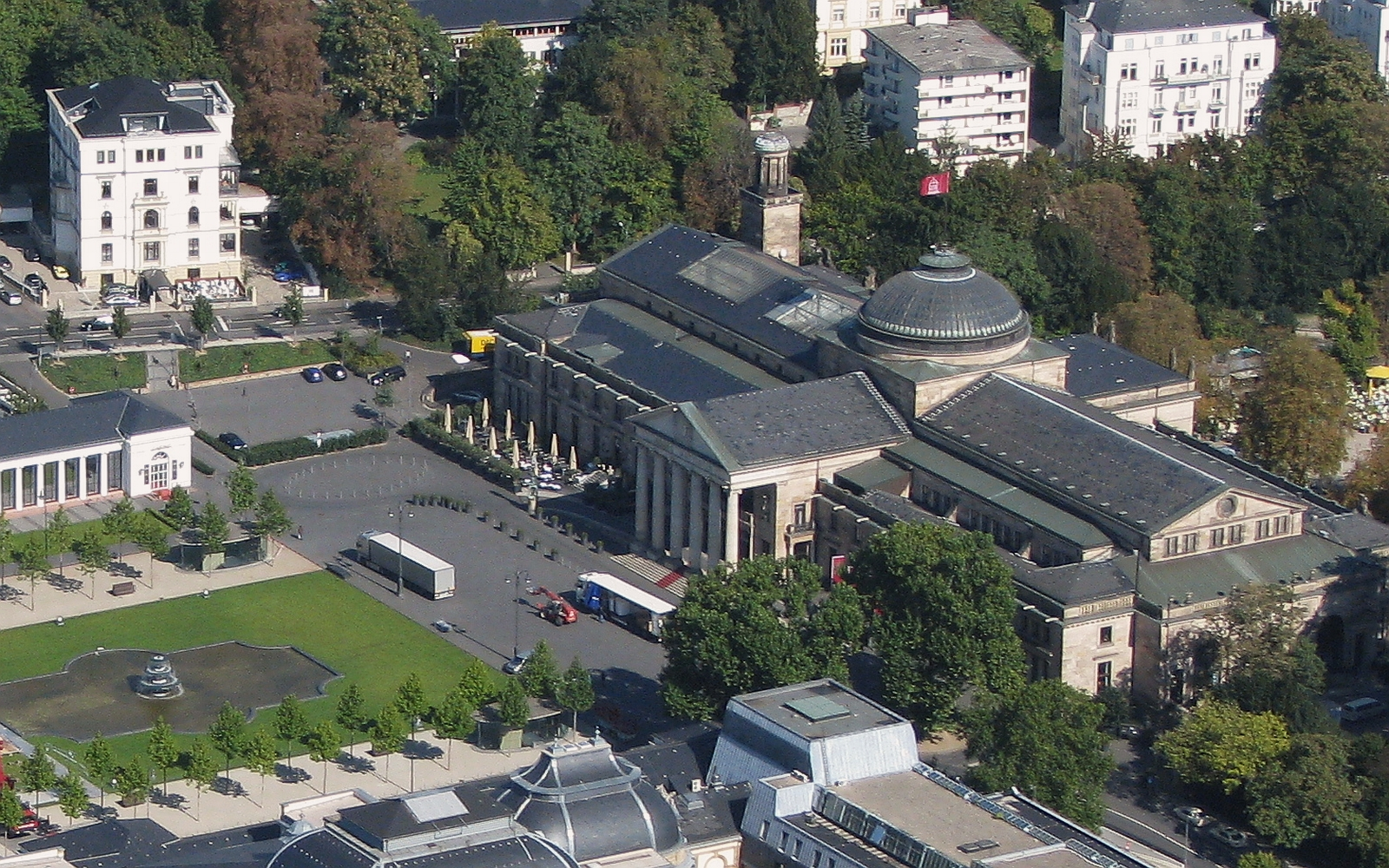 Wiesbaden Luftbild Spielbank im Kurhaus - das kleine Spiel in den Kurhauskolonnaden links - Foto 2008 Wolfgang Pehlemann Wiesbaden DSCN8907